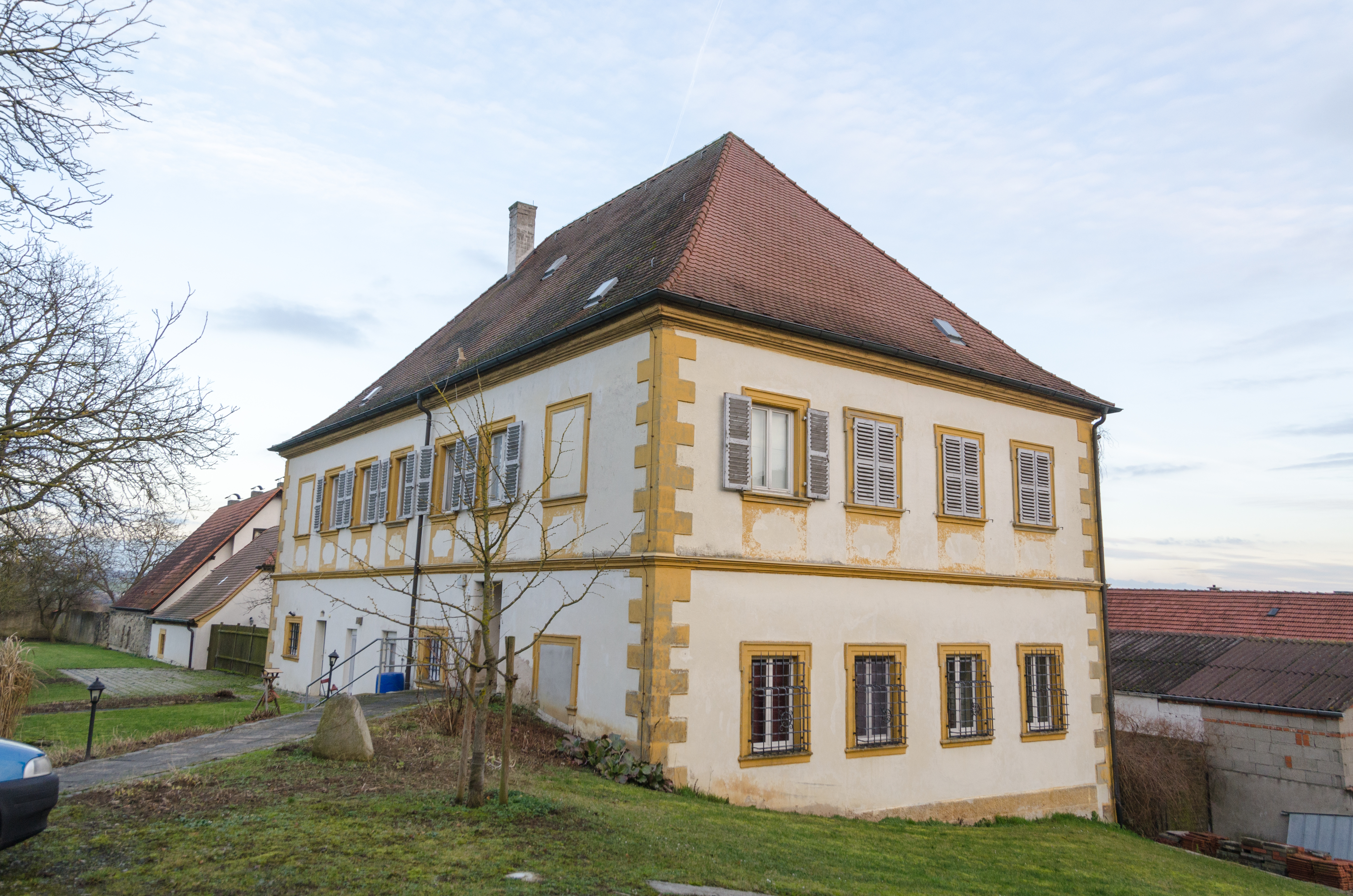 Gochsheim, Weyer, Erlenstraße 4